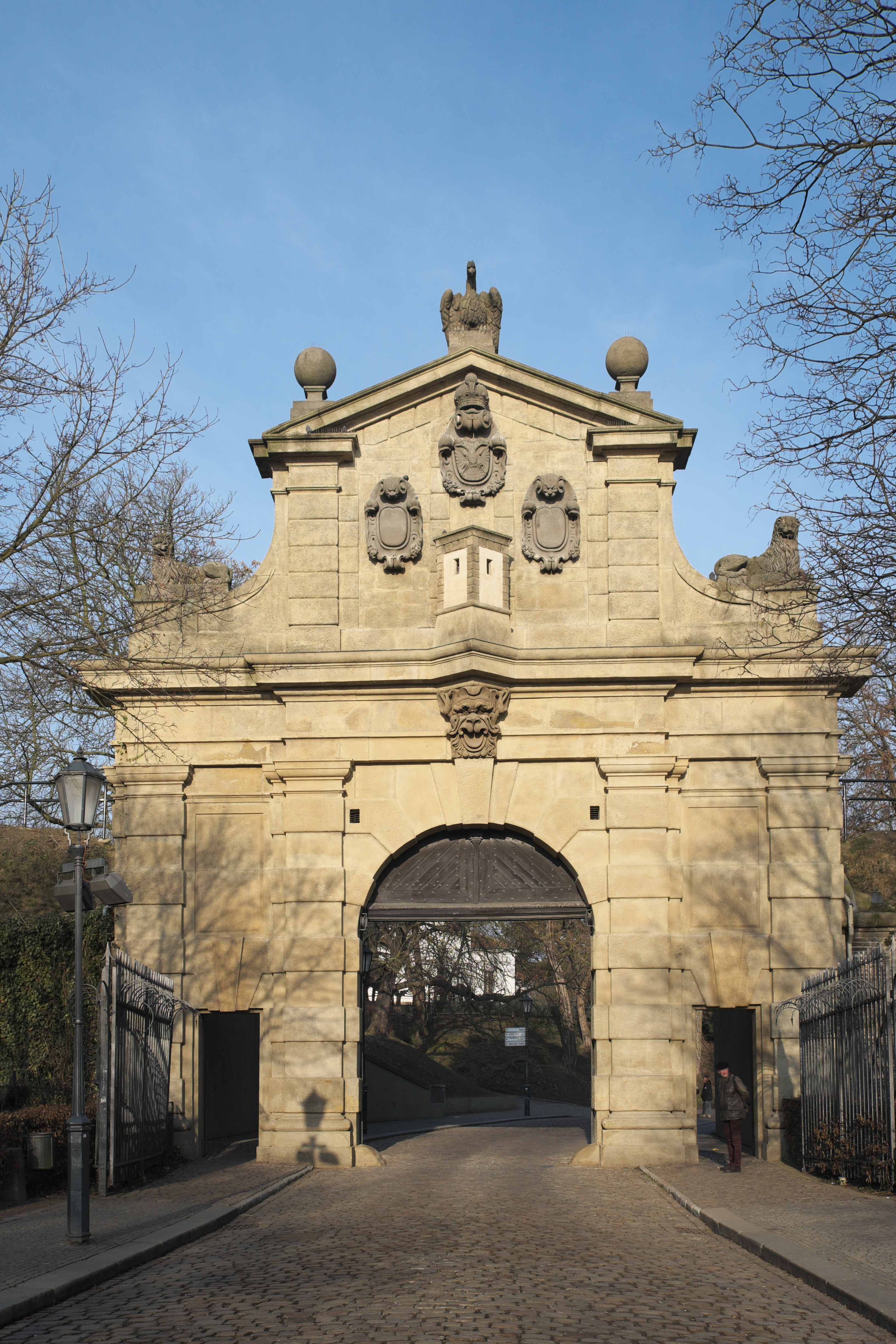 Leopolds-Tor auf dem Vyšehrad in Prag (Tschechien)